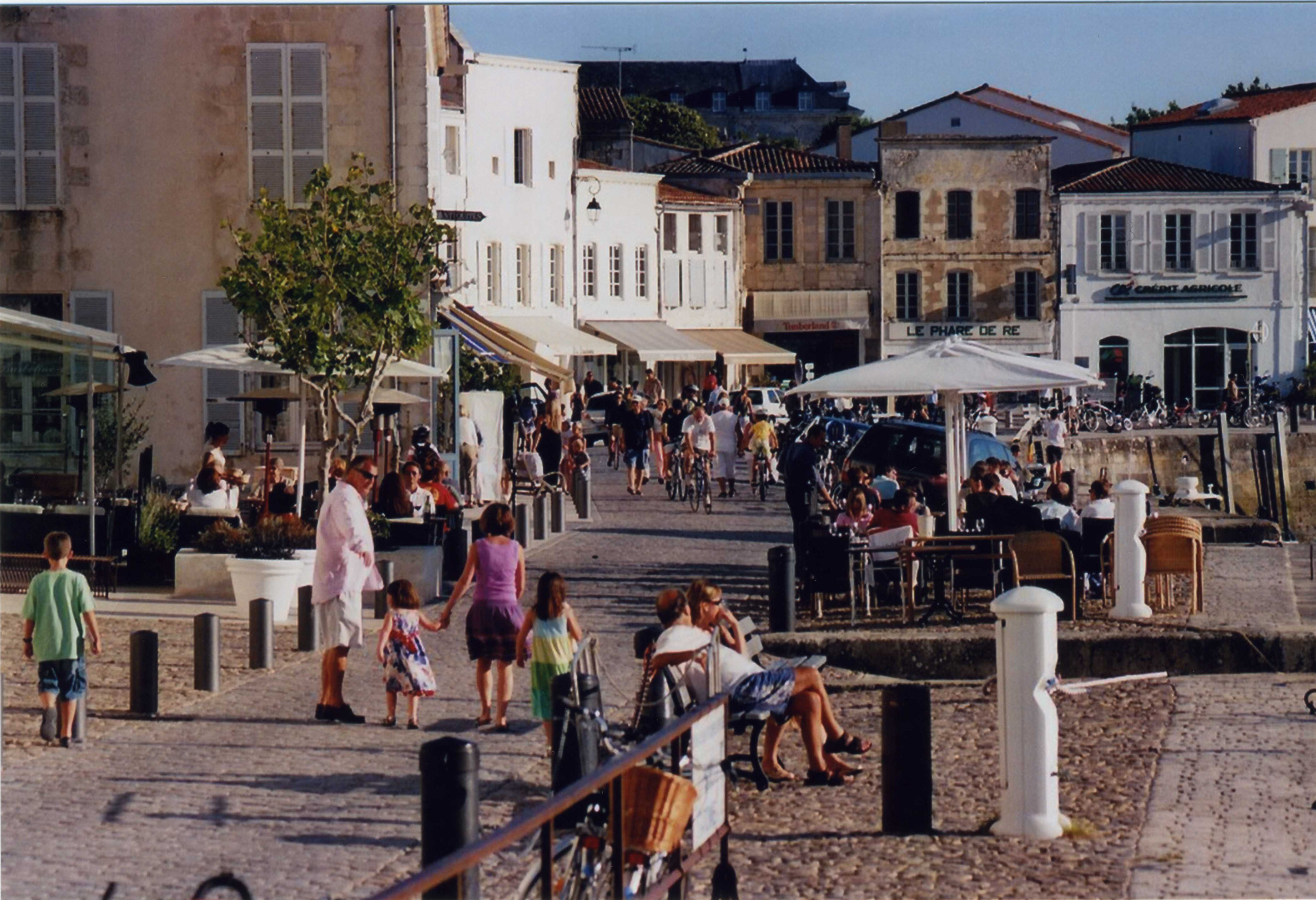 Le quai Georges Clémenceau. Saint-Martin-de-Ré, Île de Ré, Charente Maritime, France.